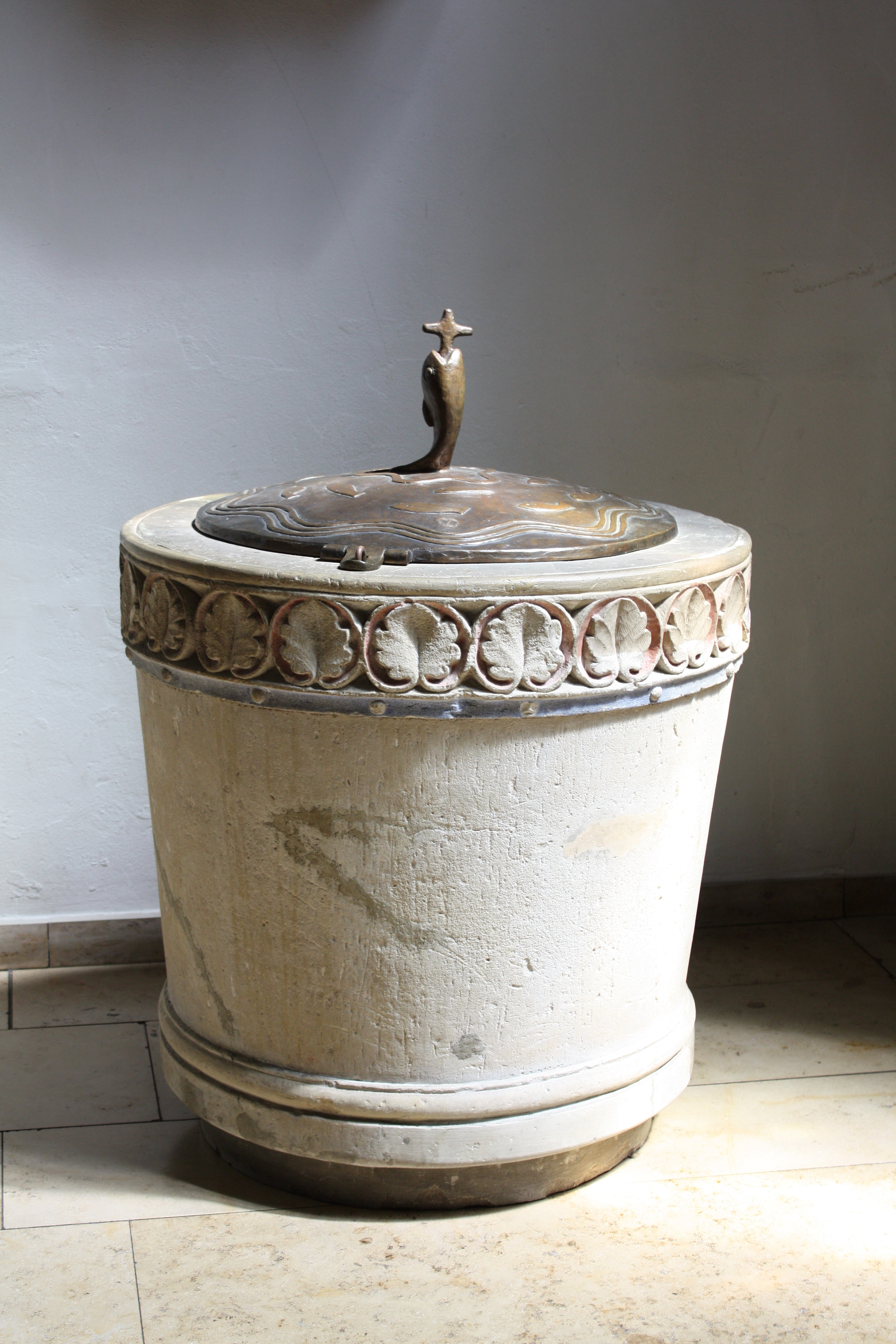 Taufstein in St. Lucia in Harsewinkel